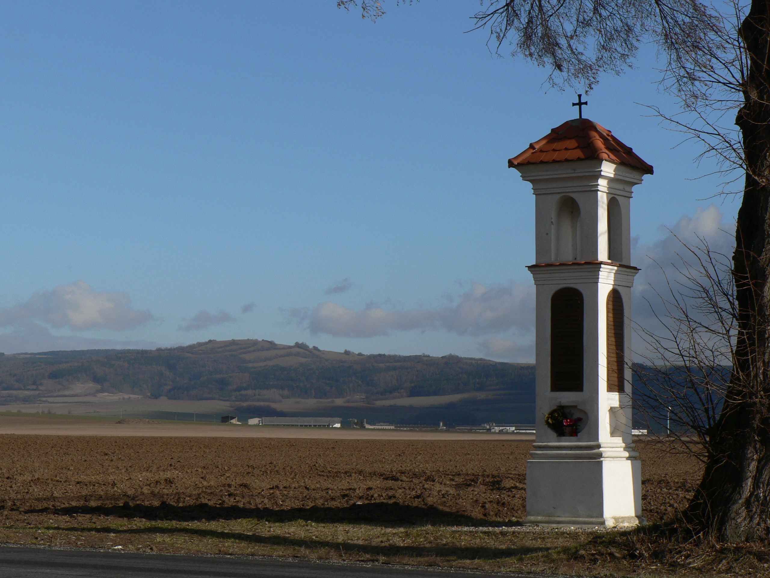 Boží muka u cesty z Šumvaldu na Uničov, katastr Šumvald, kulturní památka